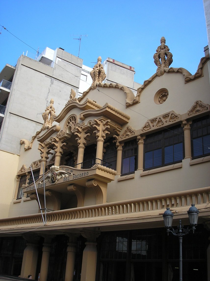 Sueca és un municipi valencià a la comarca de la Ribera Baixa. Façana de l'Ateneu Suecà del Socors.